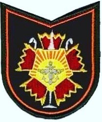 эмблема